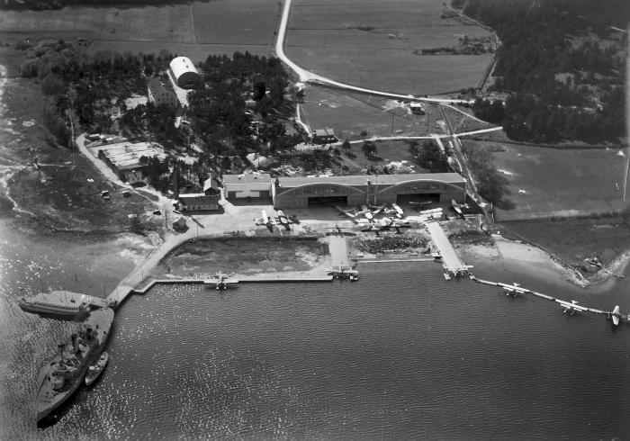 Vy över F 2 Hägernäs i Hägernäs, Uppland, med pansarskeppet HMS Göta